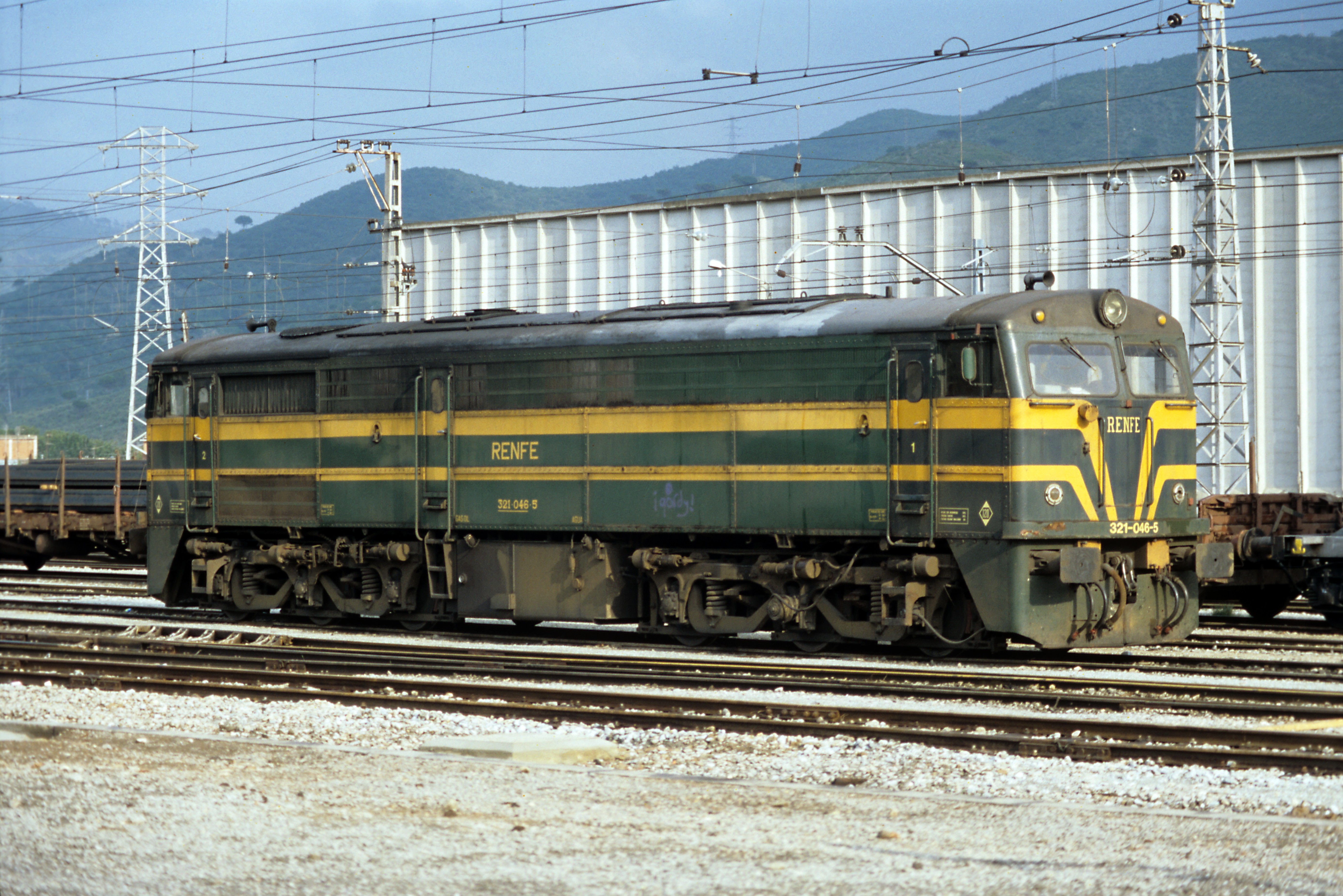 Trotz der europäischen Wagenkasteform ein typischer Amerikaner mit Schwanenhalsdrehgestellen.